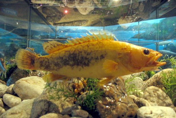 부산해양자연사박물관에 박제로 전시된 황쏘가리(Siniperca scherzeri).